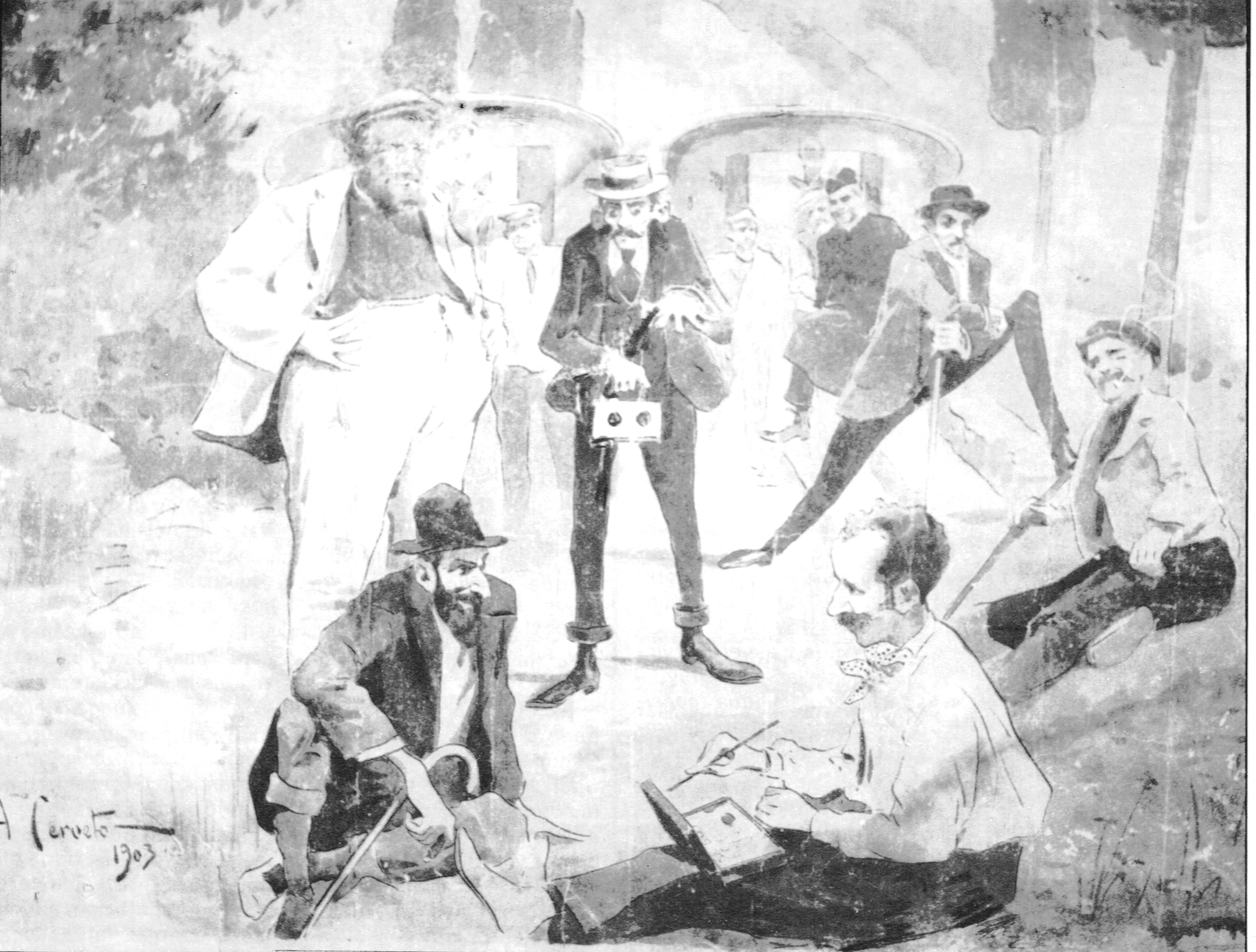 Penya del "Hoyo" en una excursió a l'ermita de Mig Camí (Tortosa). Aiguada d'Antoni Cerveto, en primer pla, tanmateix Francesc Mestre i Noè apareix al centre del grup d'amics.